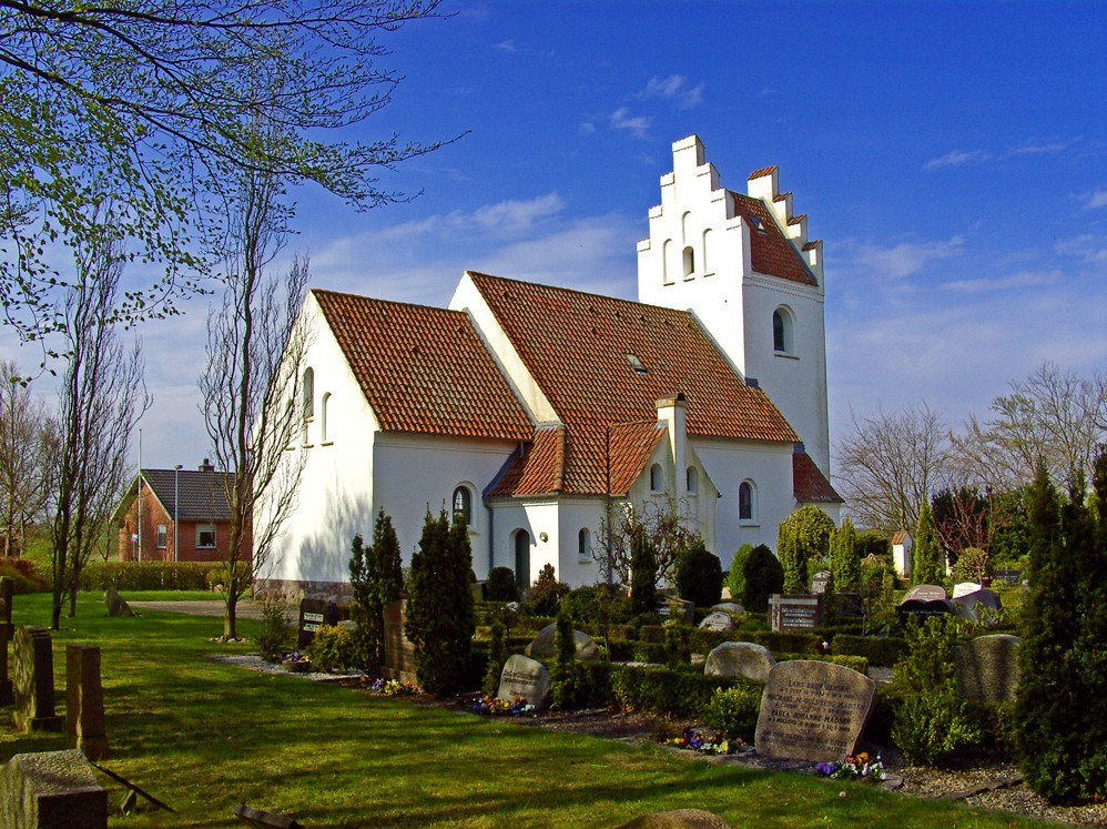 fra nordøst